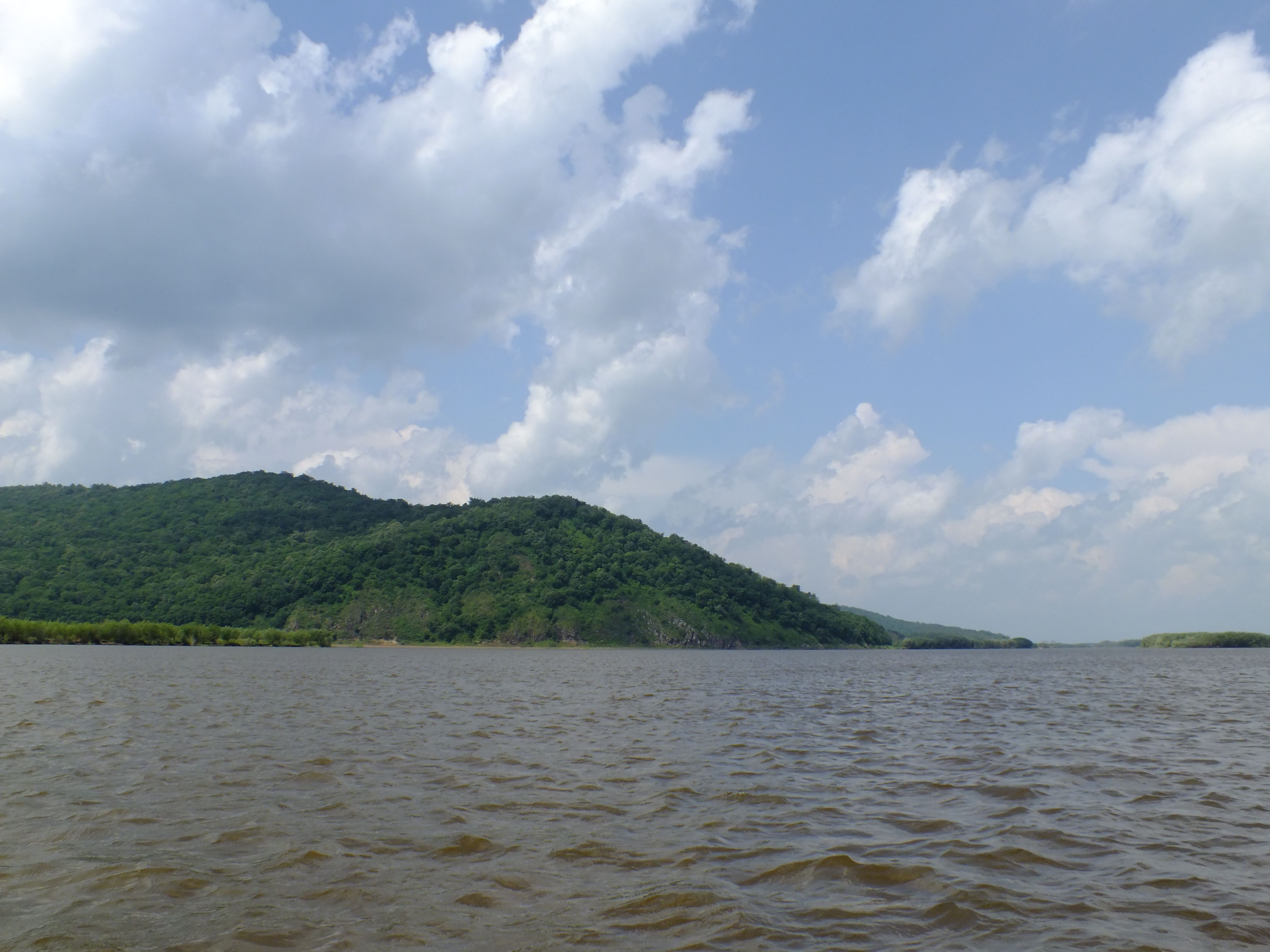 Мыс Серебряный утес, Хабаровский край